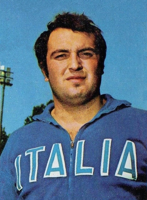 CAMPIONI dello SPORT 1973/74-Figurina n.65- VECCHIATTO -ATLETICA LEGGERA-Rec